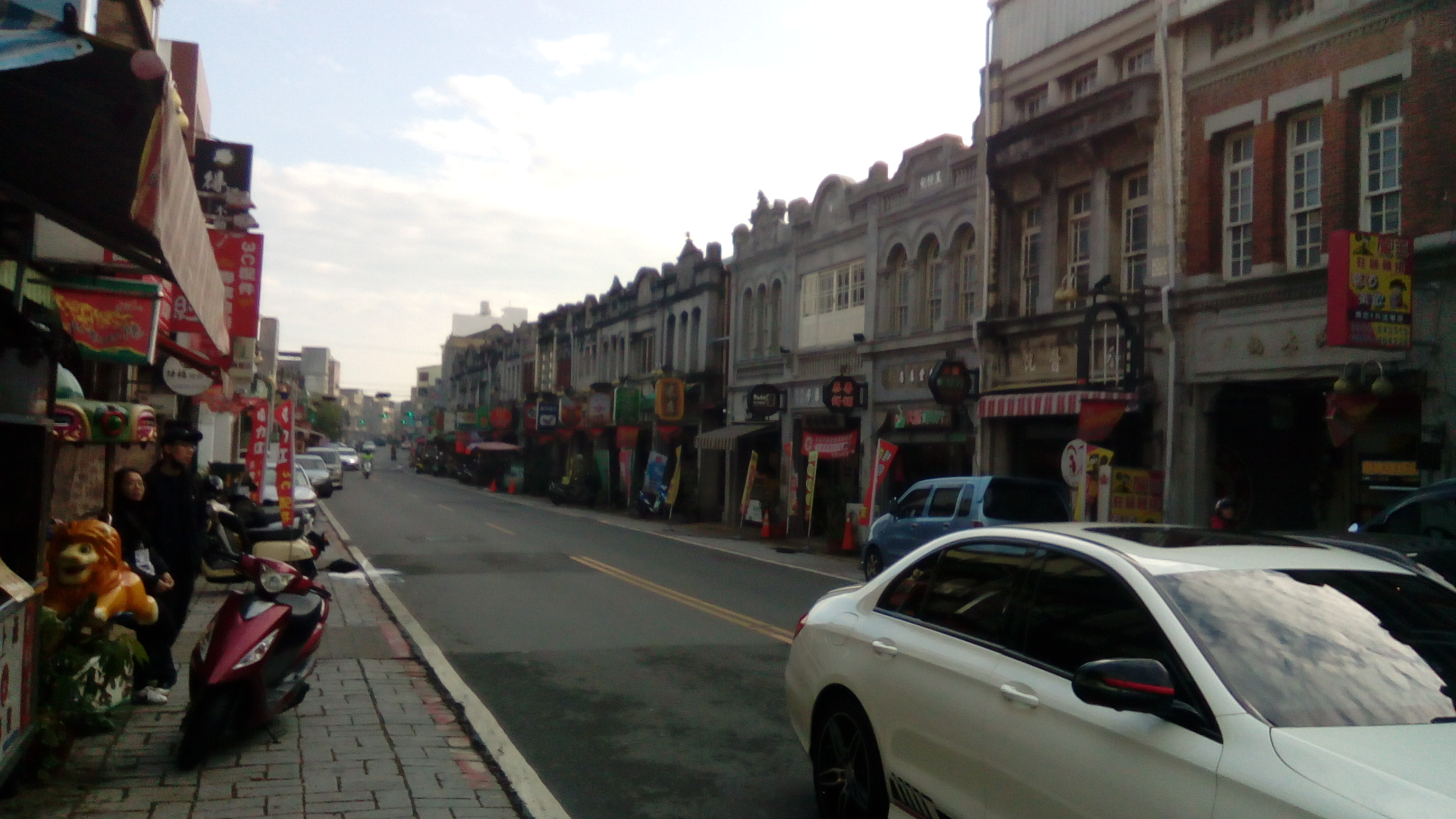 新化區中正路